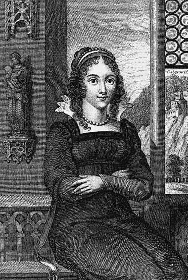 Veronika Deseniška. Posneto po: Kalchberg, 1817.